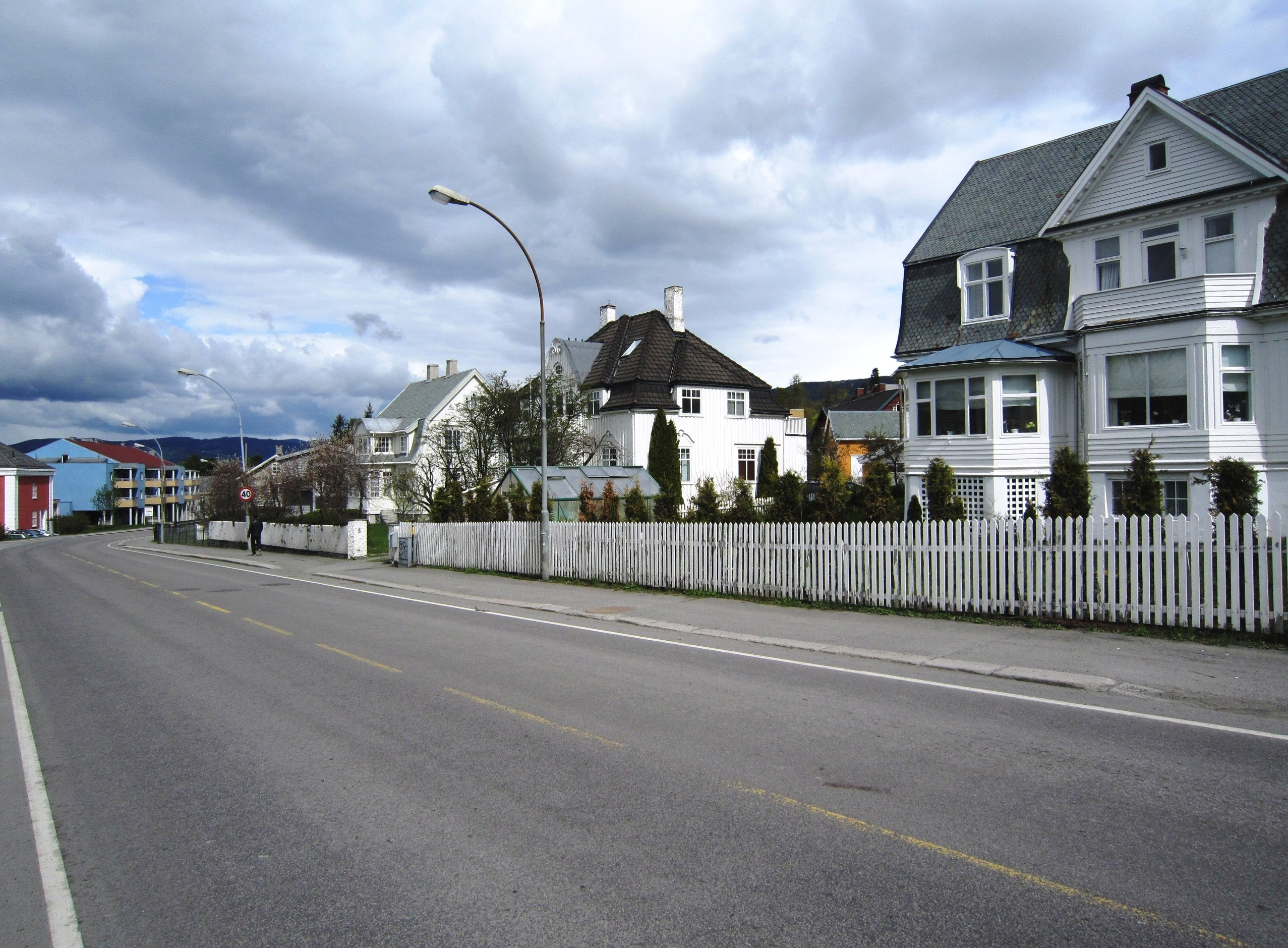 Fylkesvei 213 i Lillehammer by